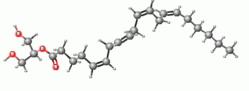 Struttura della molecola di un endocannabinoide, realizzata da Soddi tramite il programma ChemIDplus. ChemIDplus is a free, web-based search system that provides access to structure and nomenclature authority files used for the identification of chemical substances cited in National Library of Medicine (NLM) databases.